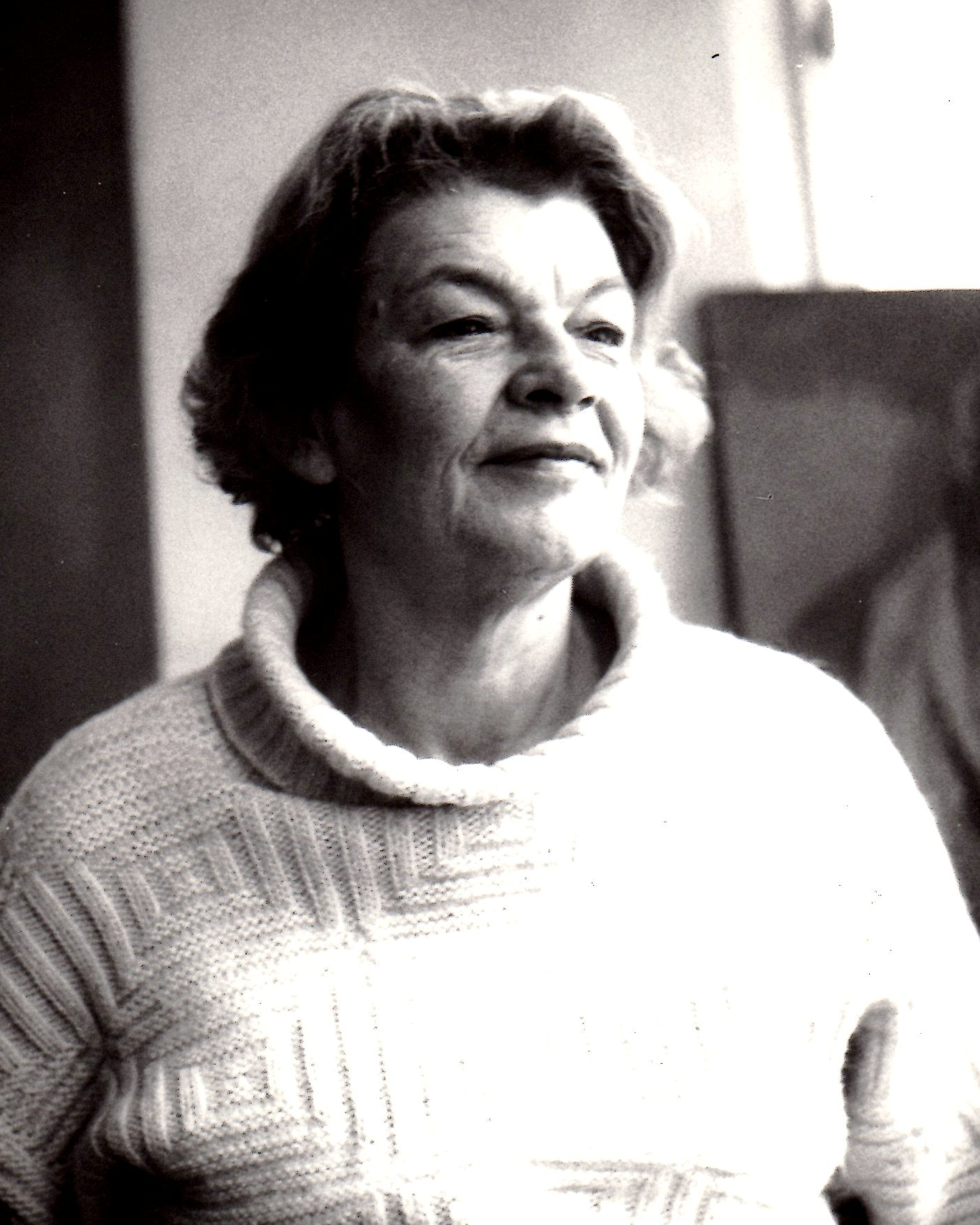 Foto der Künstlerin in schwarz-weiß